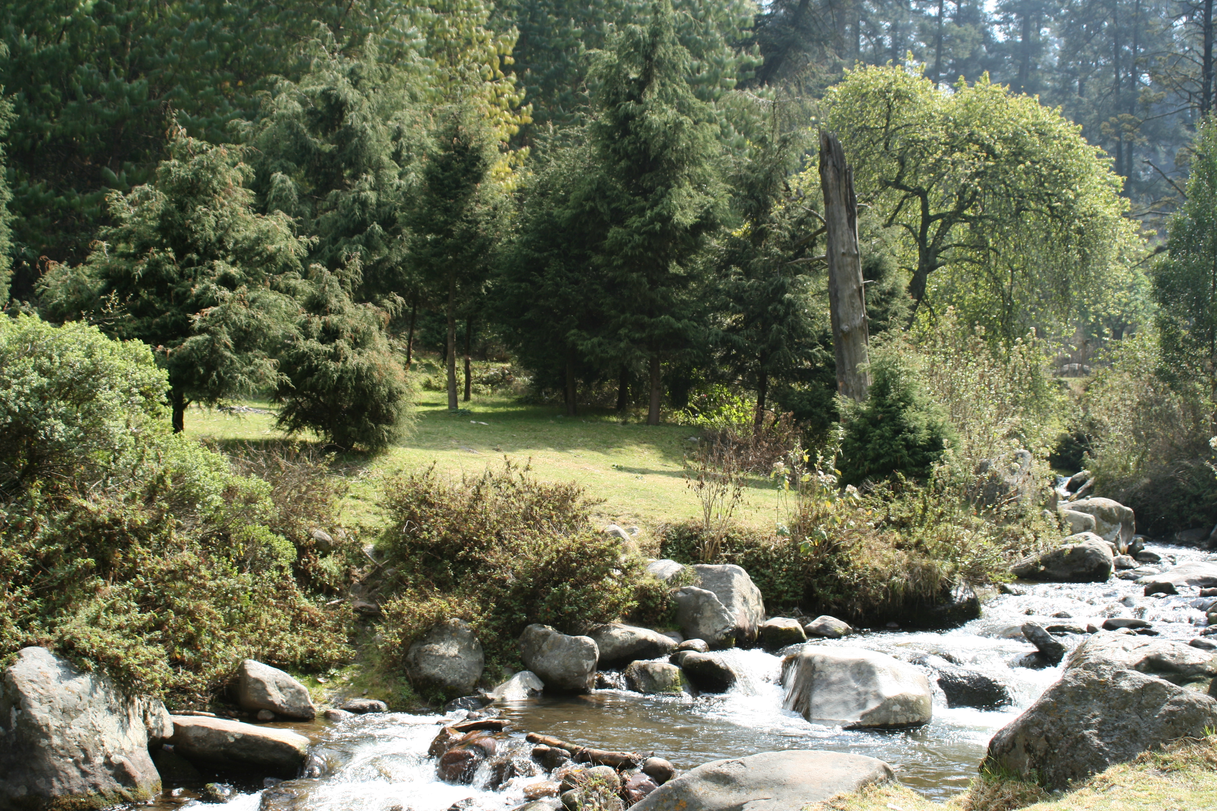 Biodeversidad. Los Dinamos, Mexico (D.F.)